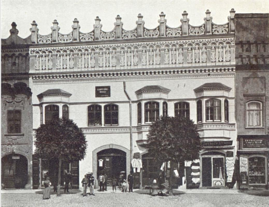 Palais ou Maison Rákóczi à Prešov, Slovaquie. XVIIe siècle. Photographie de 1909.